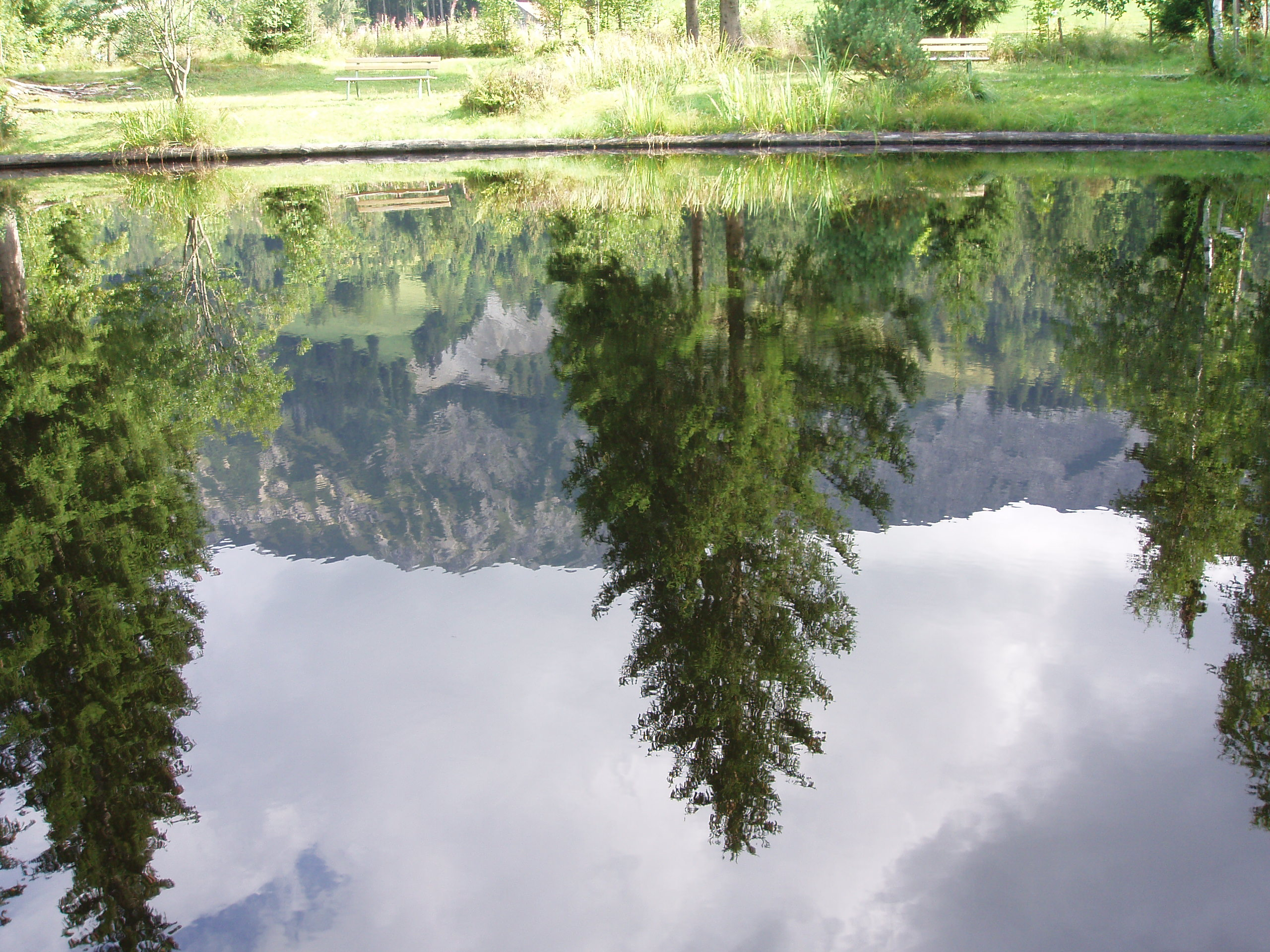 Spiegelung im Moorbad in Oberjoch